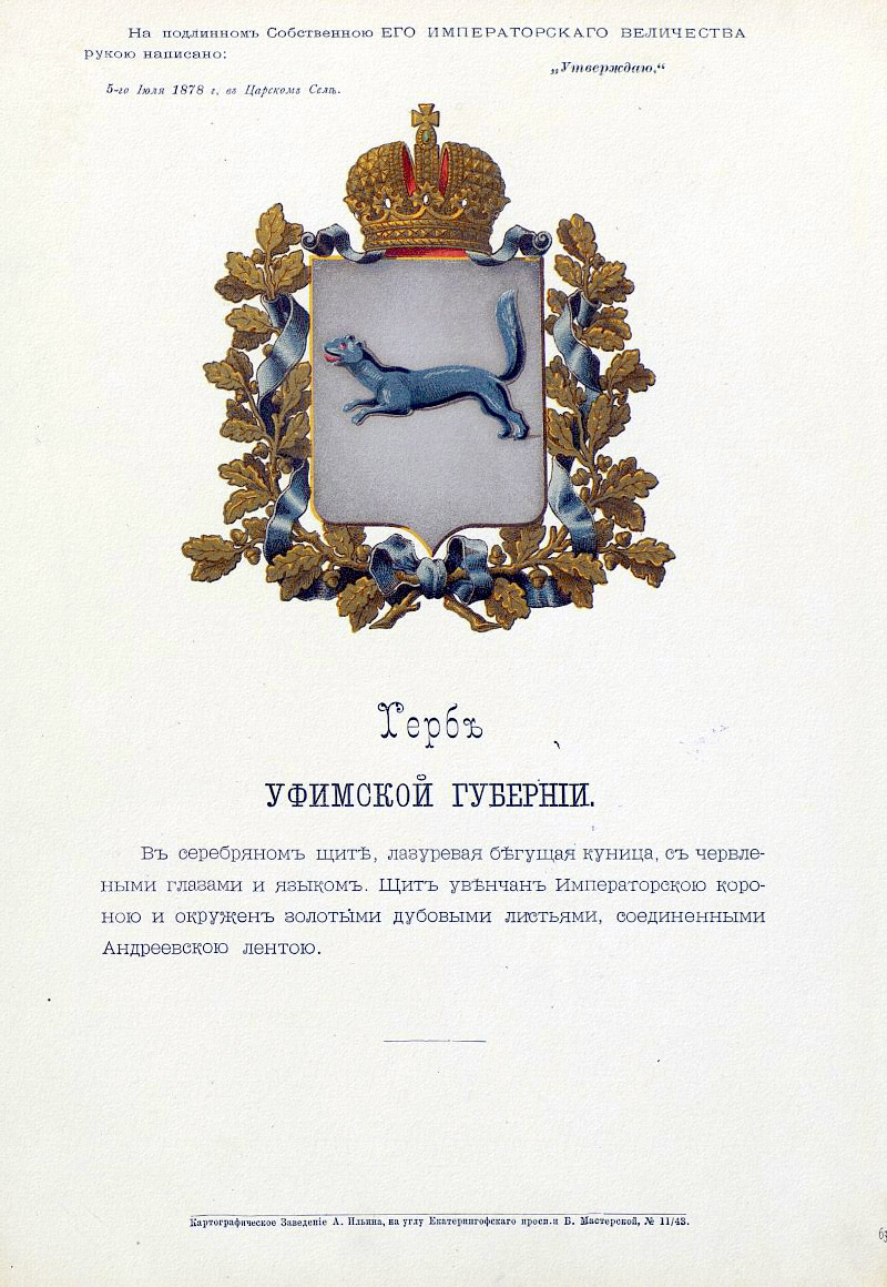 Official Russian Empire coat of arms Ufa Governorate. Герб Российской Империи Уфимской губернии с официальным описанием в Гербовнике МВД Российской Империи издания Бенке 1880 года. Утверждён Императором Всероссийским Александром Вторым 5 июля 1878 года.